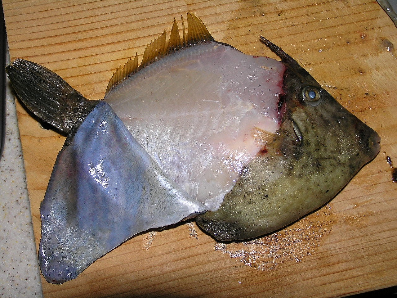 マルハゲの皮を剥いた姿